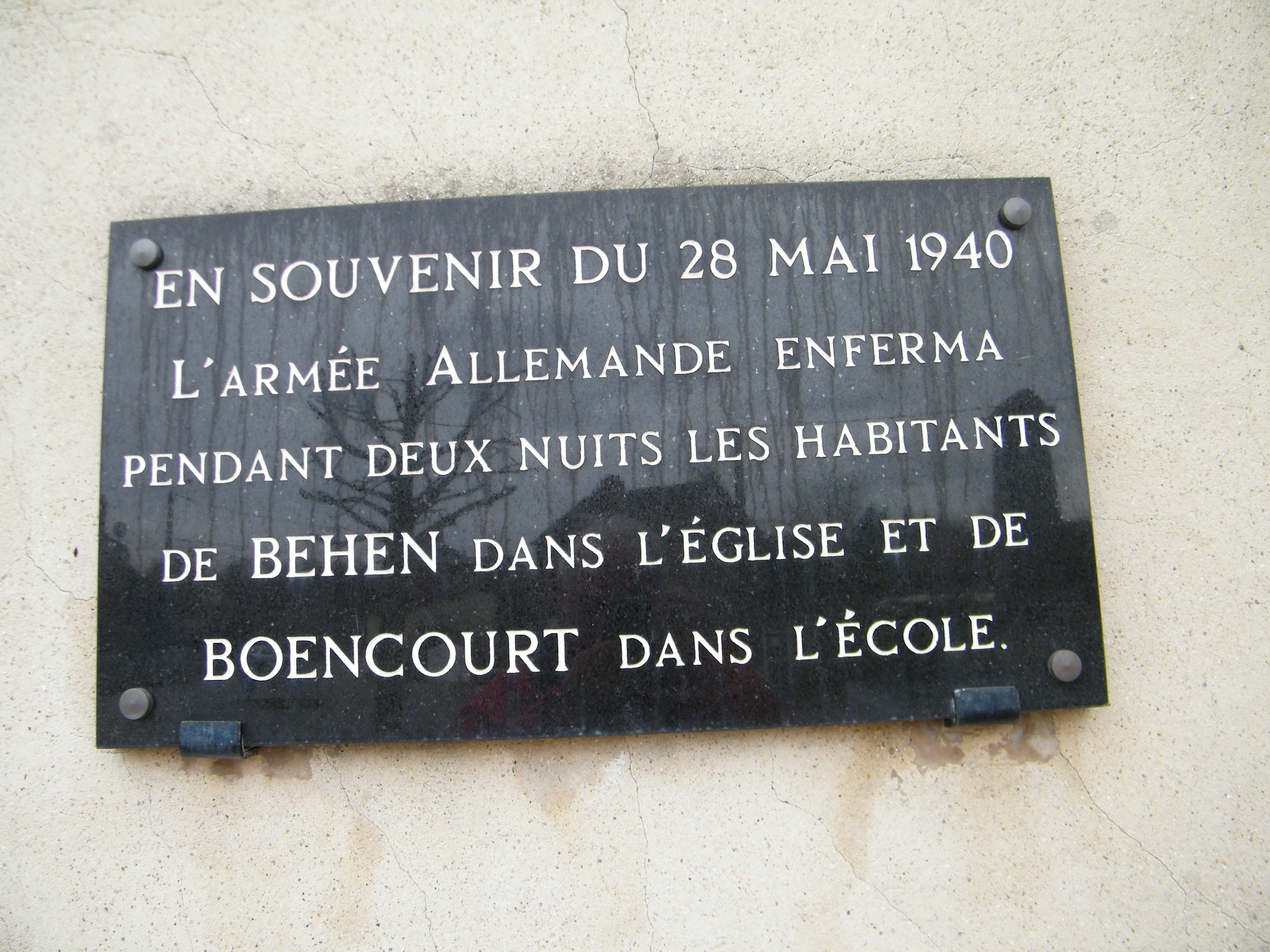 Plaque sur l'église. (guerre 1939-1945)